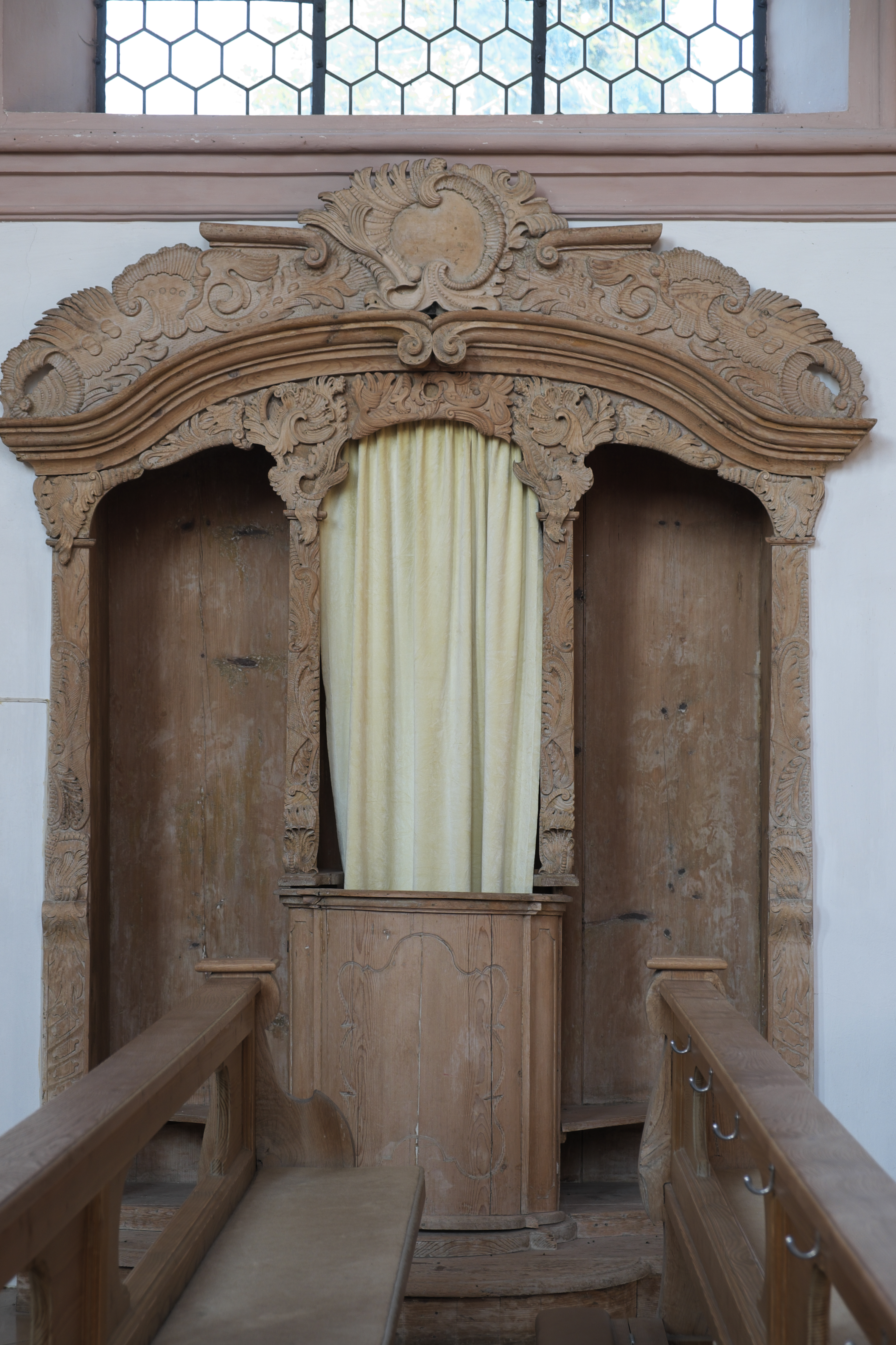 Katholische Pfarrkirche St. Gordian und Epimachus in Stöttwang im Landkreis Ostallgäu (Bayern/Deutschland), Beichtstuhl